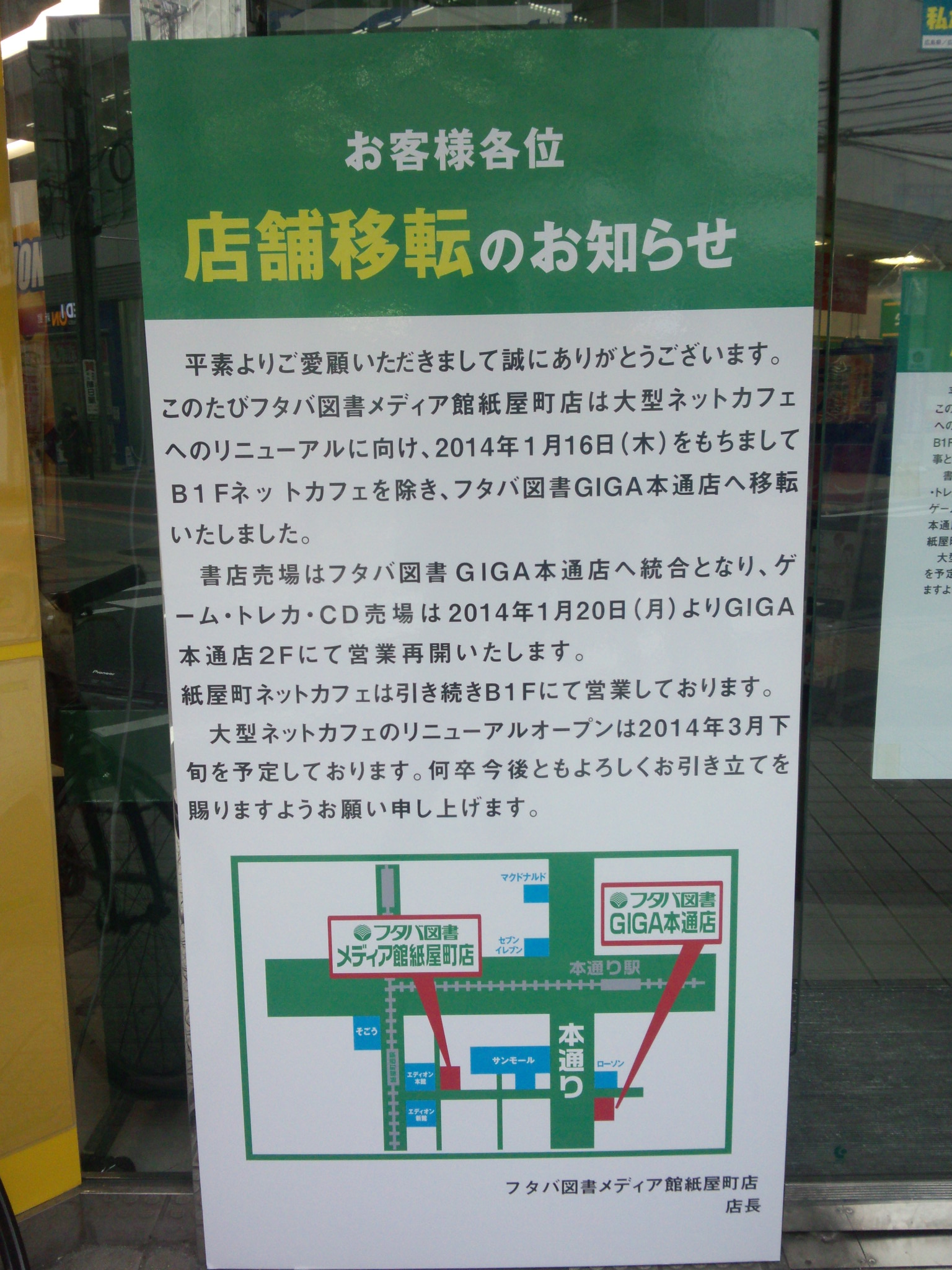 フタバ図書メディア館紙屋町店が移転した時の案内看板。 地下一階futaba@cafe紙屋町店は引き続き営業。